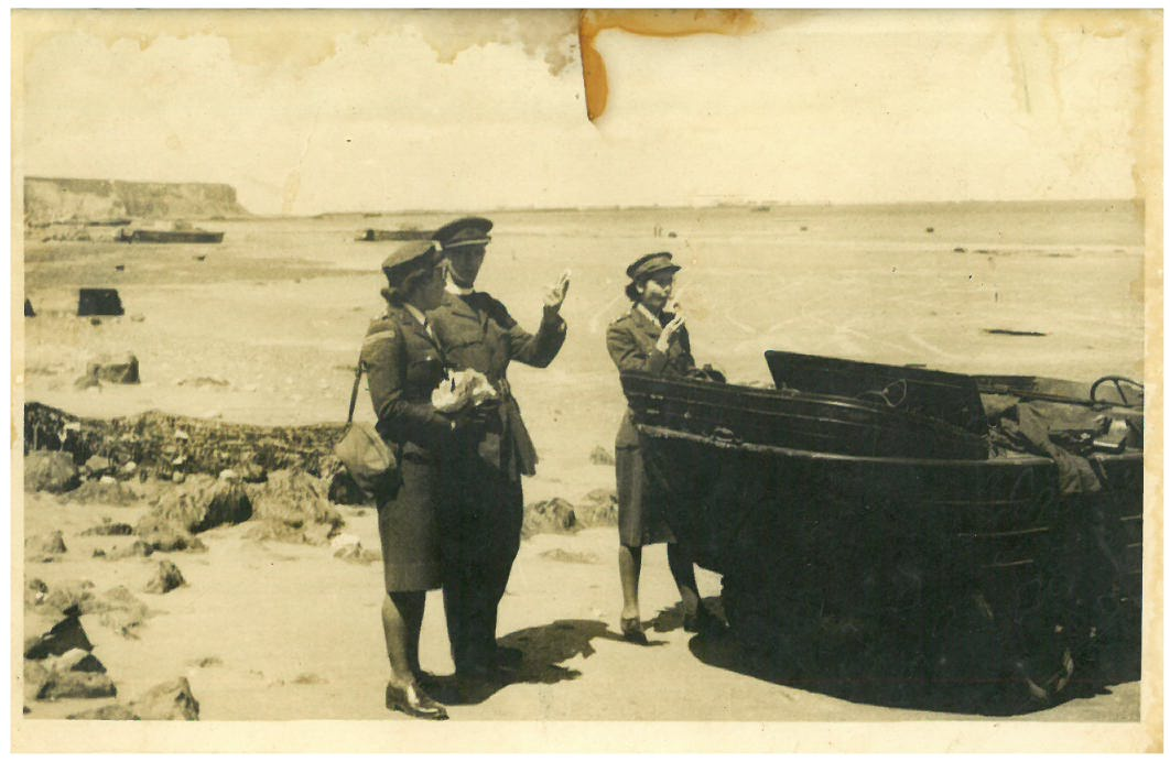 Deux femmes du ATS visitent Asnelles quelques jours après le Débarquement. Collection: Mikaël Berthaud